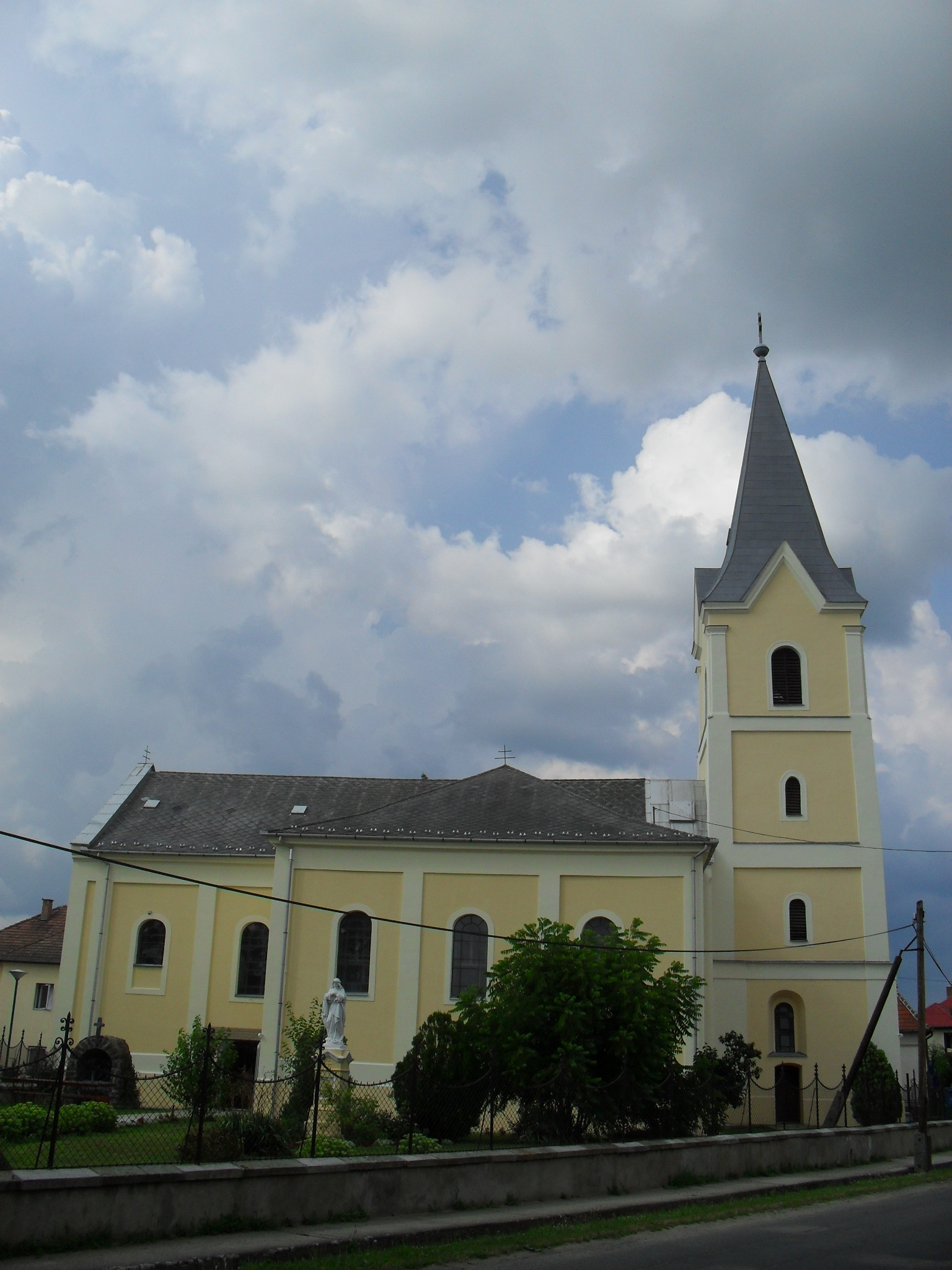 Ludányhalászi - Szent András római katolikus templom